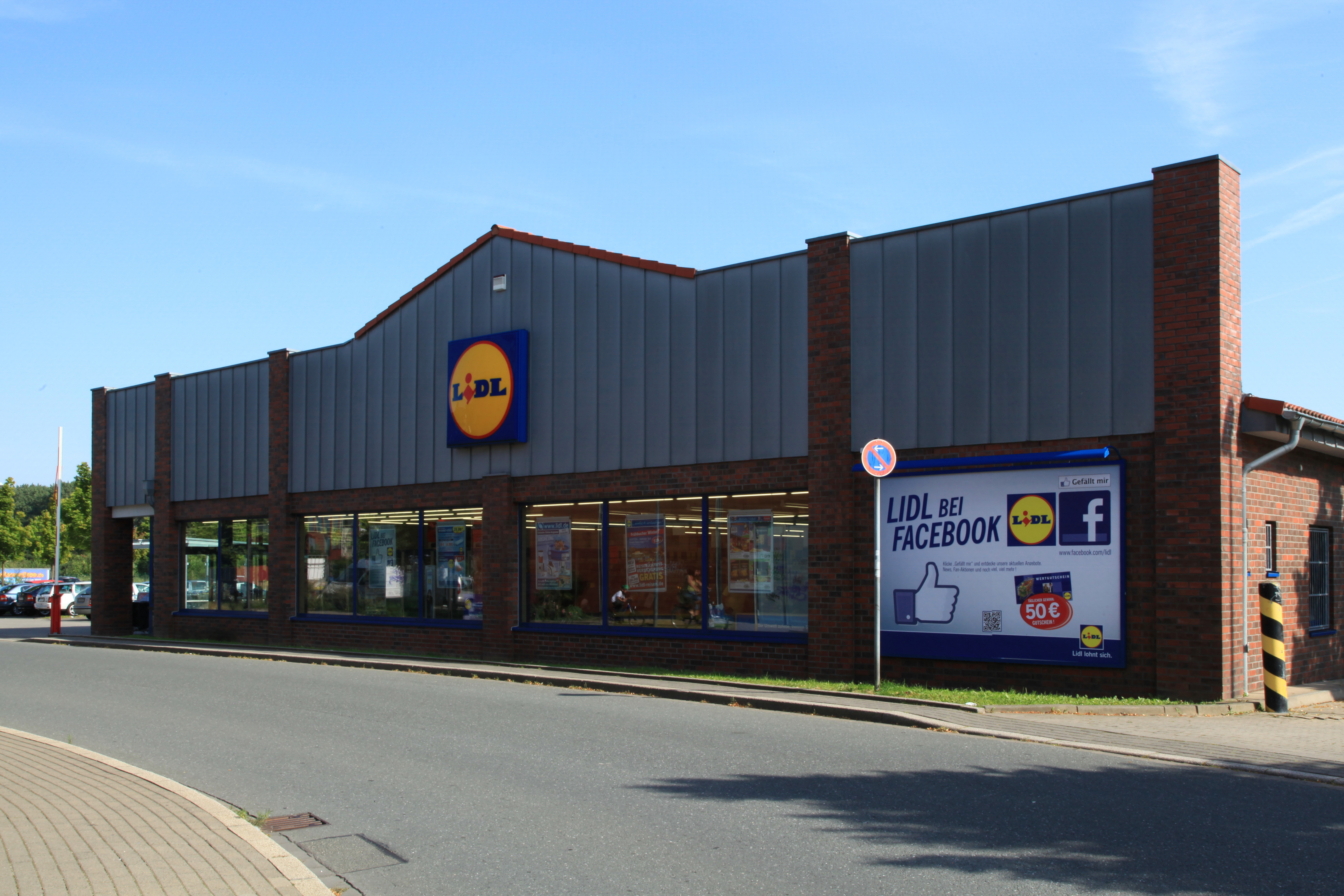 Neu bebautes Gelände der ehemaligen Zeche Lothringen 1/2/6 an der Amtmann-Ibing-Straße in Bochum